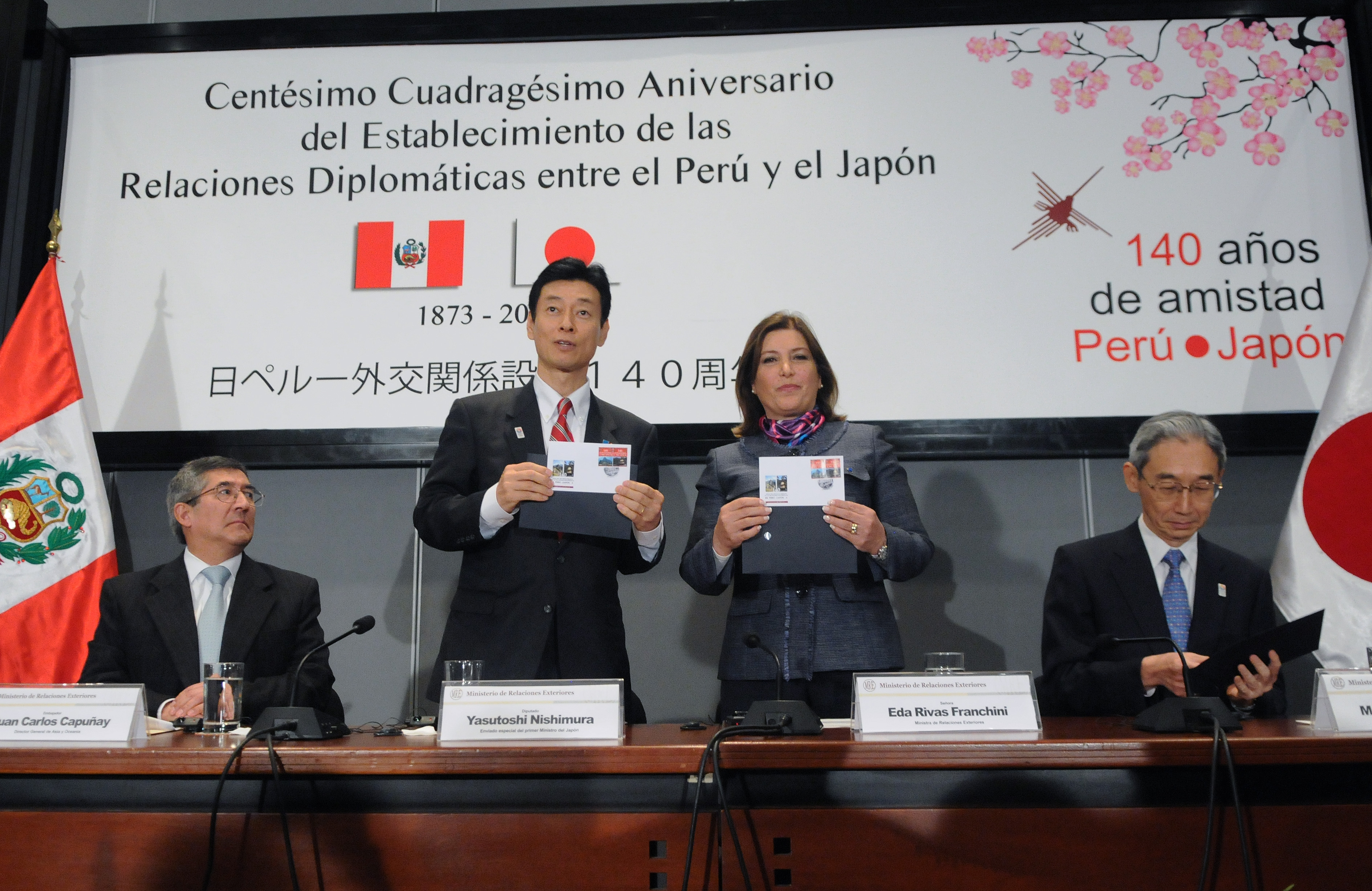 Como parte de las actividades para conmemorar el “Centésimo Cuadragésimo Aniversario del Establecimiento de las Relaciones Diplomáticas entre el Perú y el Japón”, la Ministra de Relaciones Exteriores, Eda Rivas Franchini, encabezó hoy, en la sede de la Cancillería, una ceremonia oficial que contó con la presencia del Diputado japonés Yasutoshi Nishimura, Enviado Especial del Primer Ministro Shinzo Abe; y del Embajador de Japón en el Perú, Masahiro Fukukawa, entre otras altas autoridades, empresarios japoneses y miembros de la comunidad nipona en nuestro país. Sigue leyendo la nota en nuestra Web: bit.ly/1bTKnyZ